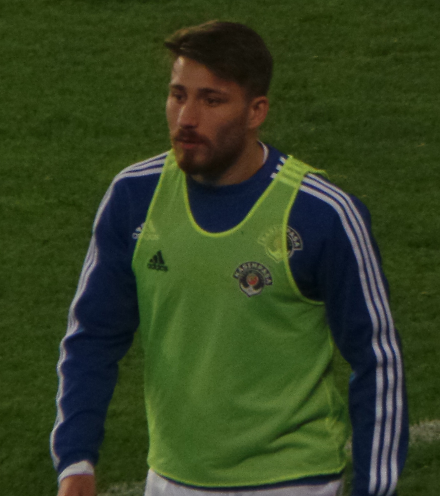 Tunay Torun vs Fener